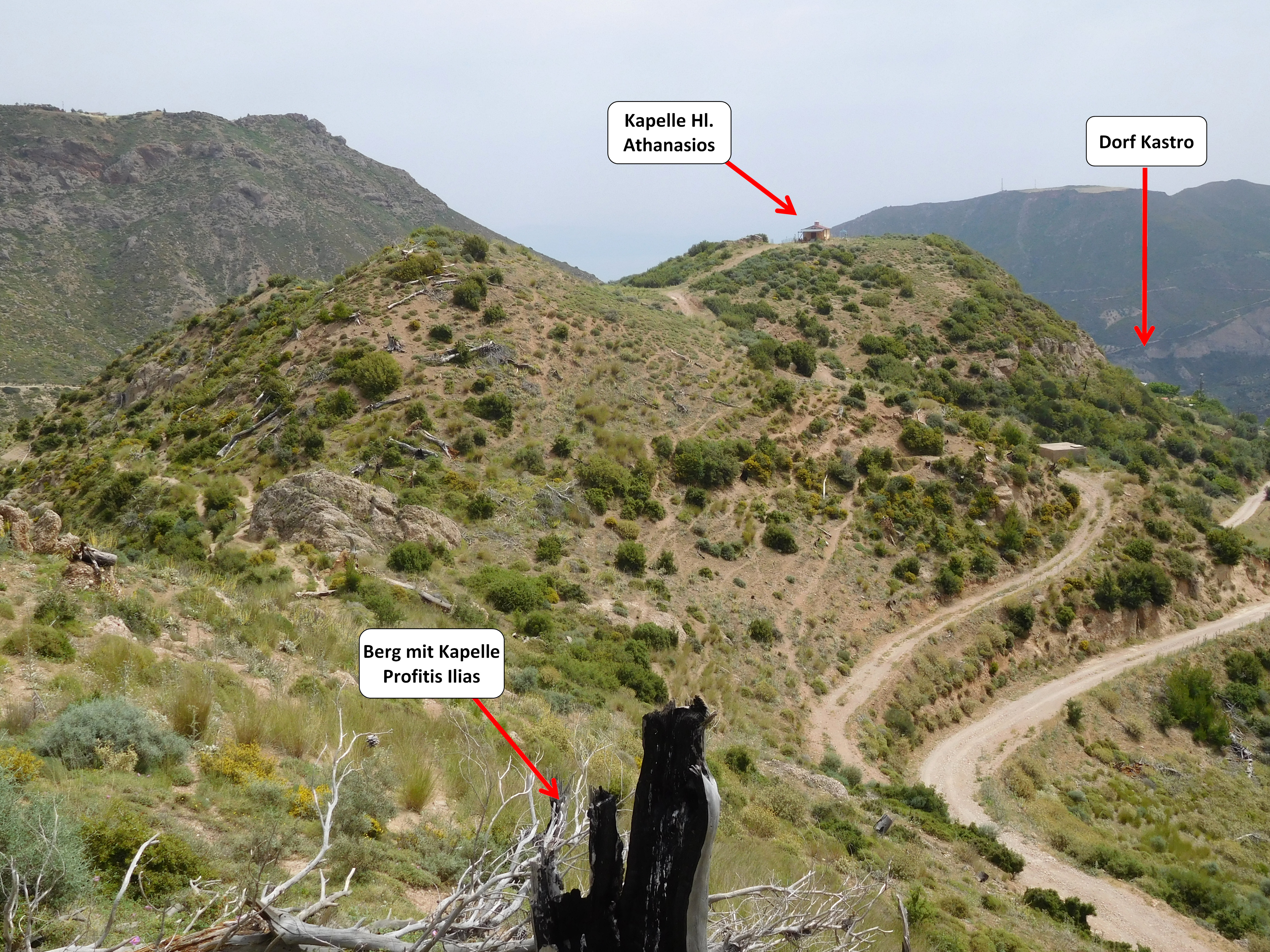 Blick auf die Hügel der ehemaligen antiken Stadt Bura, vom Süden gen Norden gesehen